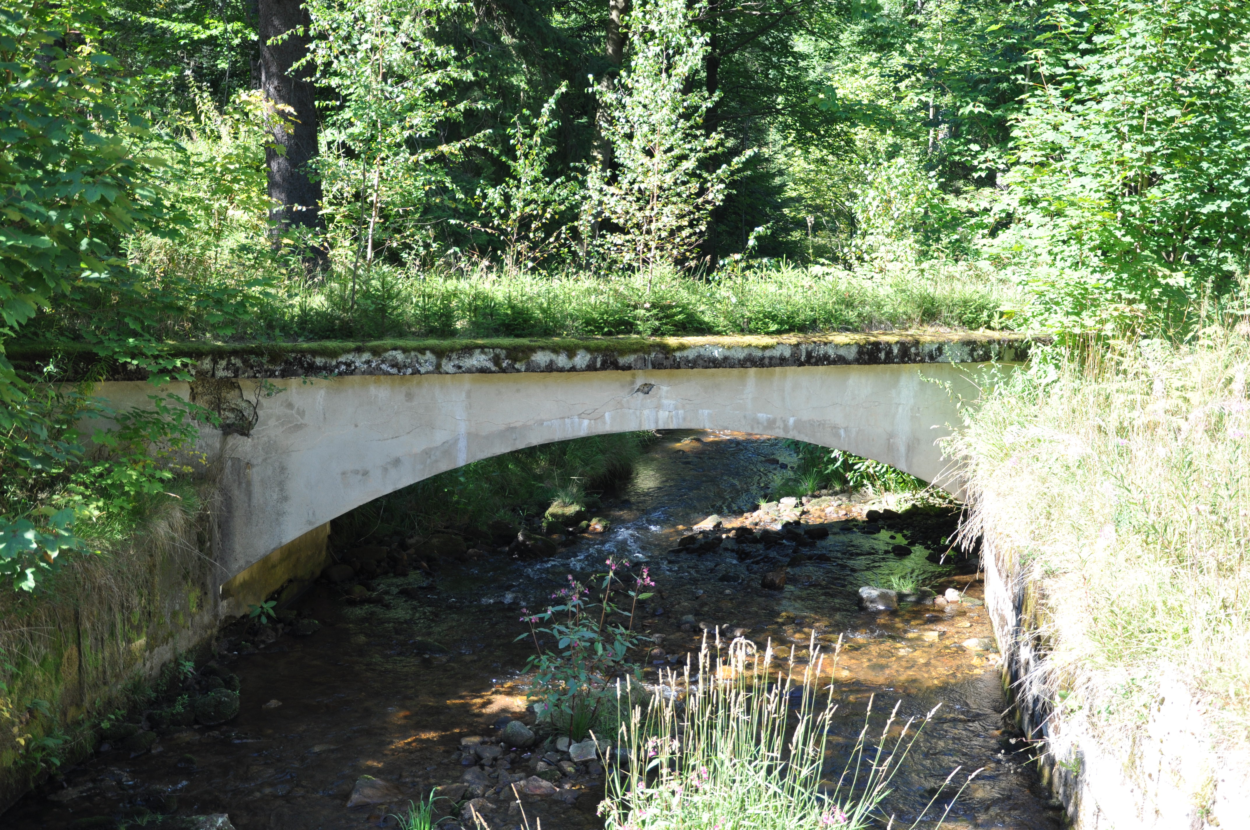 Brücke der früheren Schmalspureisenbahn am ehem. Haltepunkt Wilzschmühle der Schmalspurbahn Wilkau-Haßlau–Carlsfeld